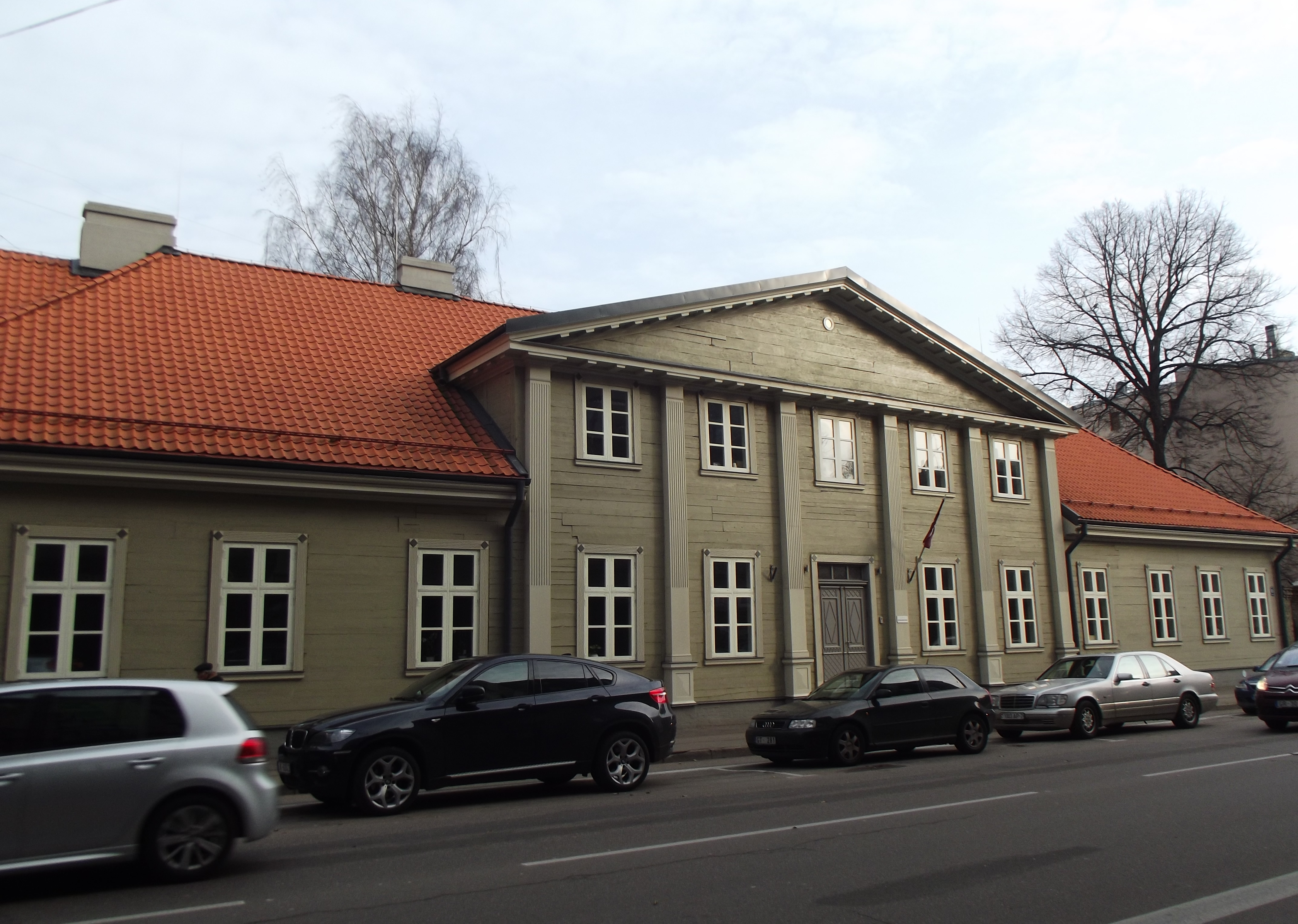 Bijusī Katrīnas skola Rīgā